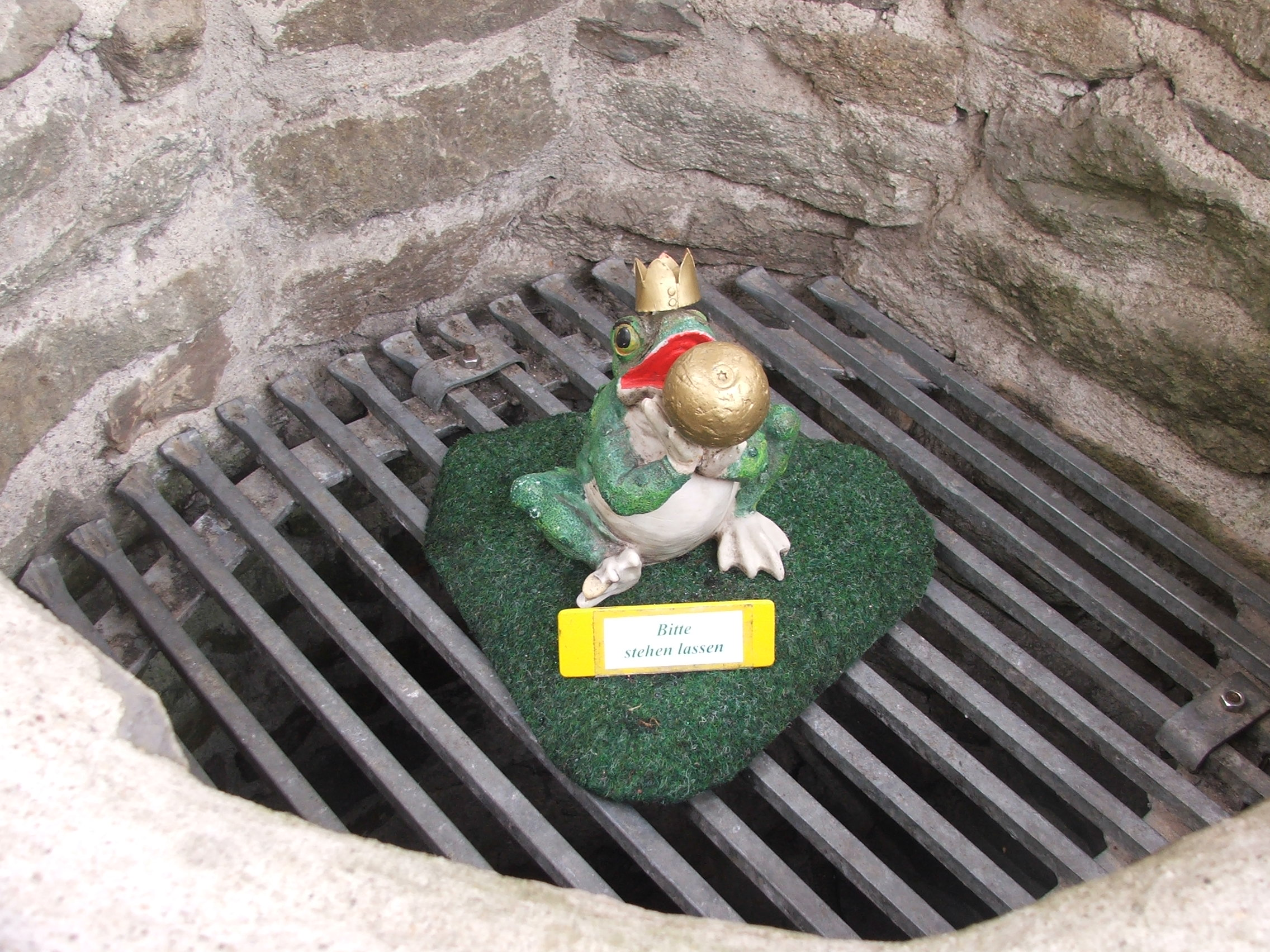 Frosch im Brunnen, Burg Bilstein, Lennestadt, Germany